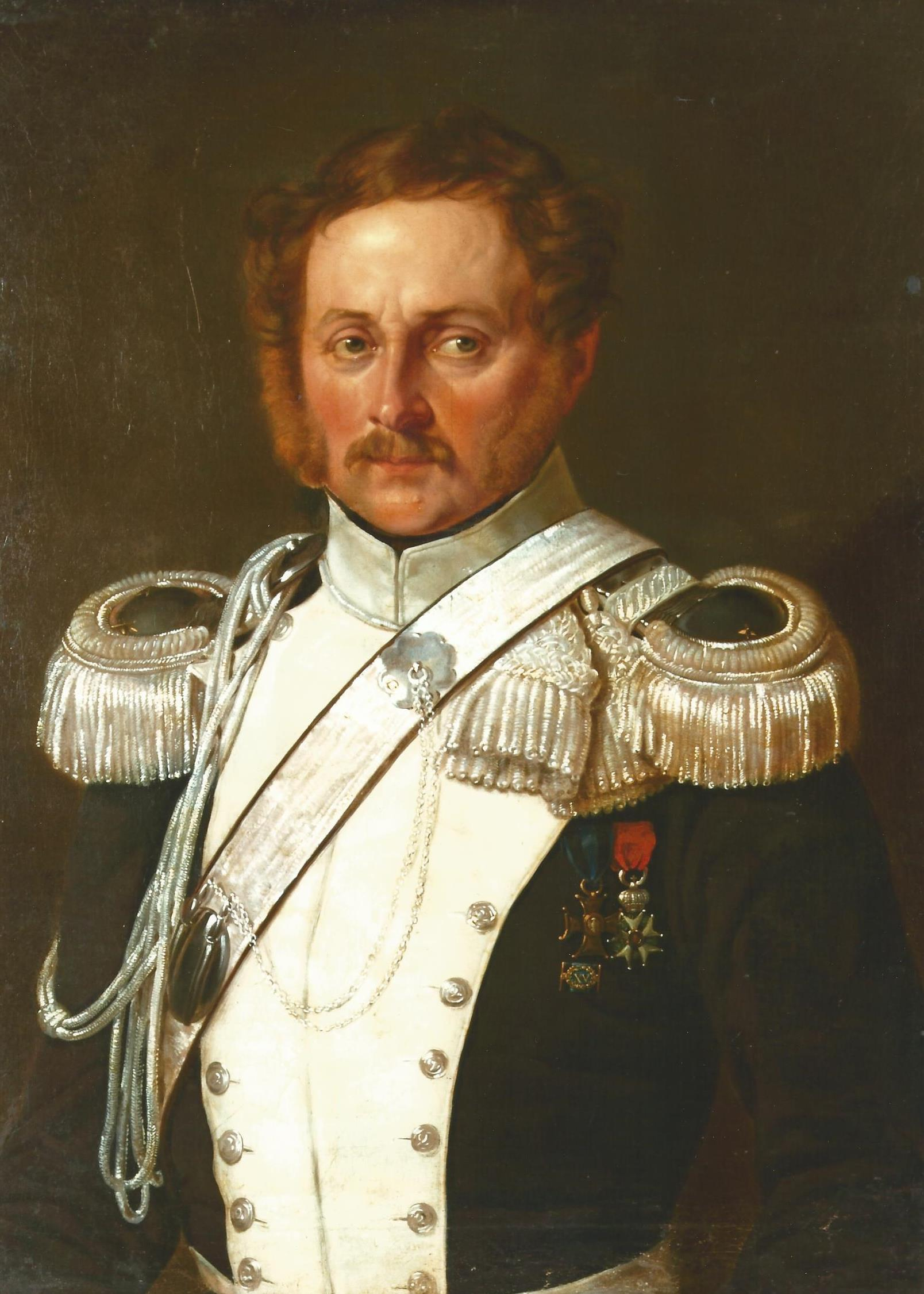 fotokopia portretu Józefa Wiśniewskiego autorstwa Aleksandra Kokulara